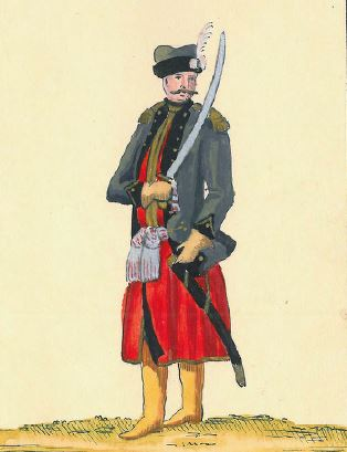 Generał Mączyński komendant 2 Pułku Straży Przedniej [oficer pułku straży przedniej Kajetana Mączyńskiego (późniejszy 5 pułk przedniej straży)]